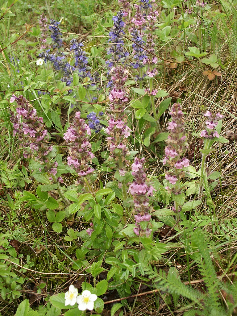 Ajuga genevensis, Tauberland, Germany